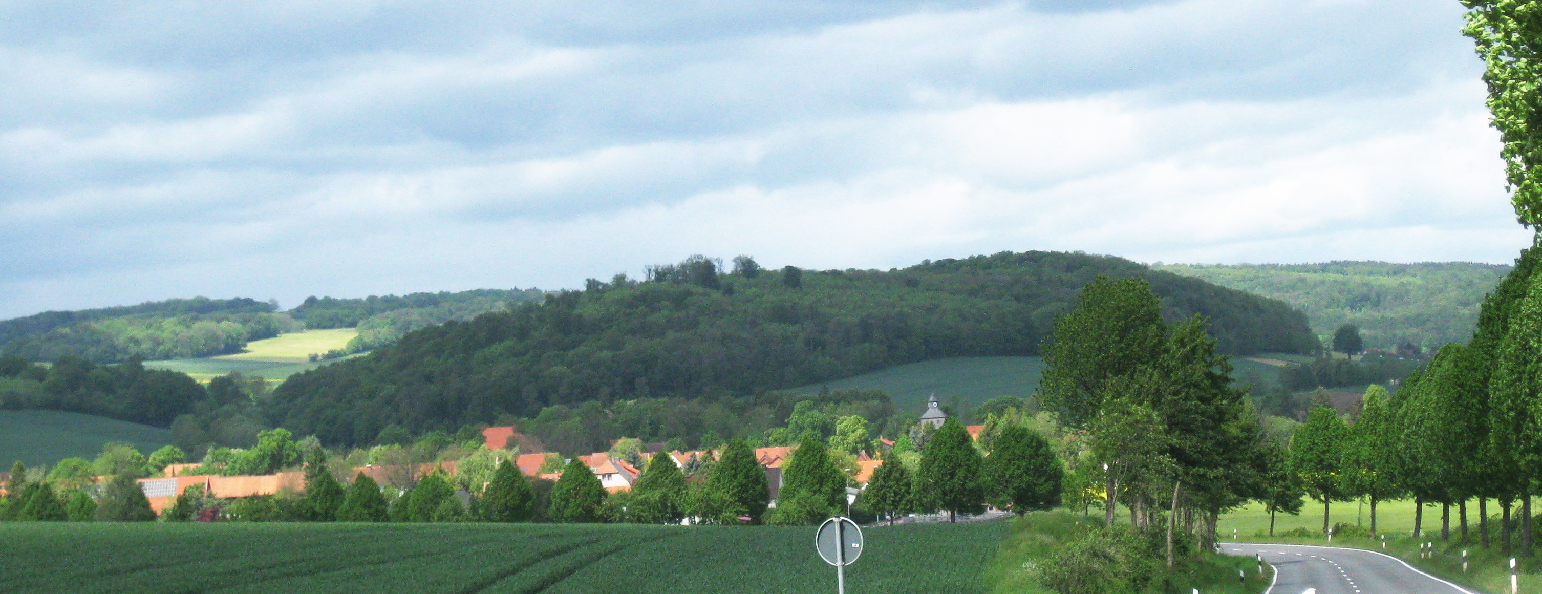 Weinberg nordöstlich von Harste, fotografiert aus südöstlicher Richtung von der Straße zwischen Harste und Lenglern aus. Landschaftsschutzgebiet „Leinebergland“ (LSG GÖ 00009). Im Hintergrund ist der Gladeberg zu sehen und im Vordergrund ein Teil von Harste.